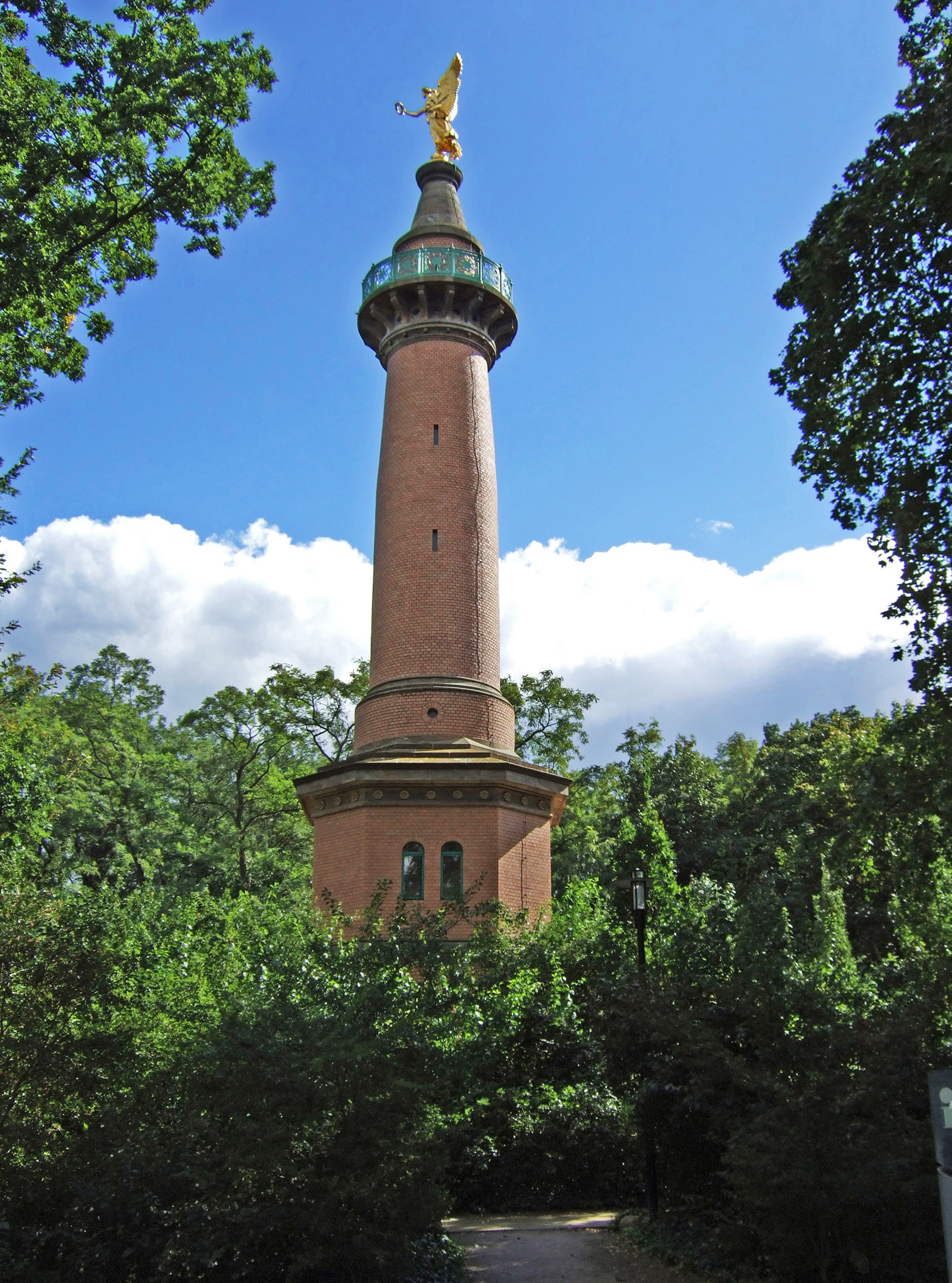 Denkmal für die Schlacht bei Fehrbellin in Hakenberg